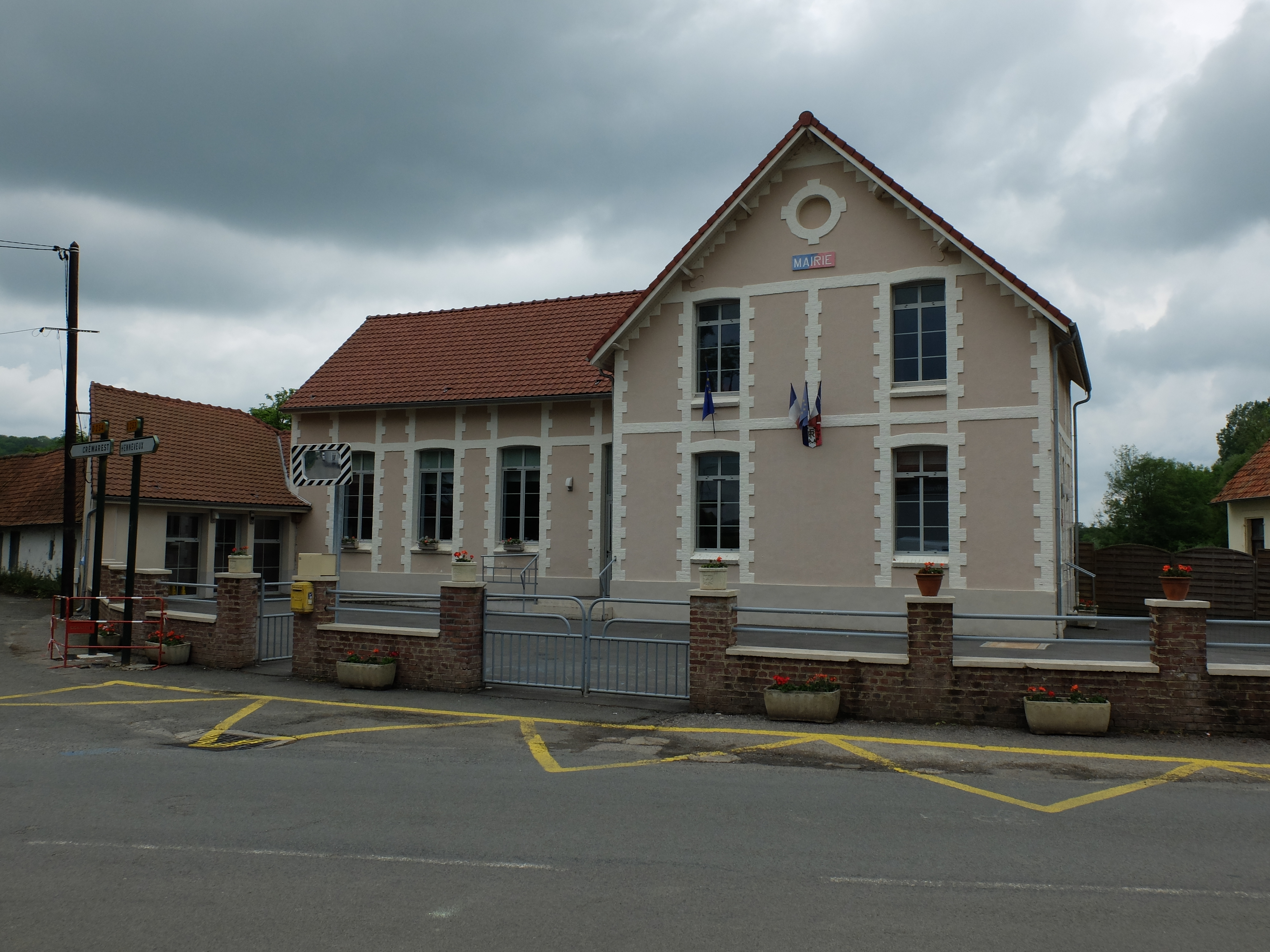 Vue de la mairie de Bournonville.